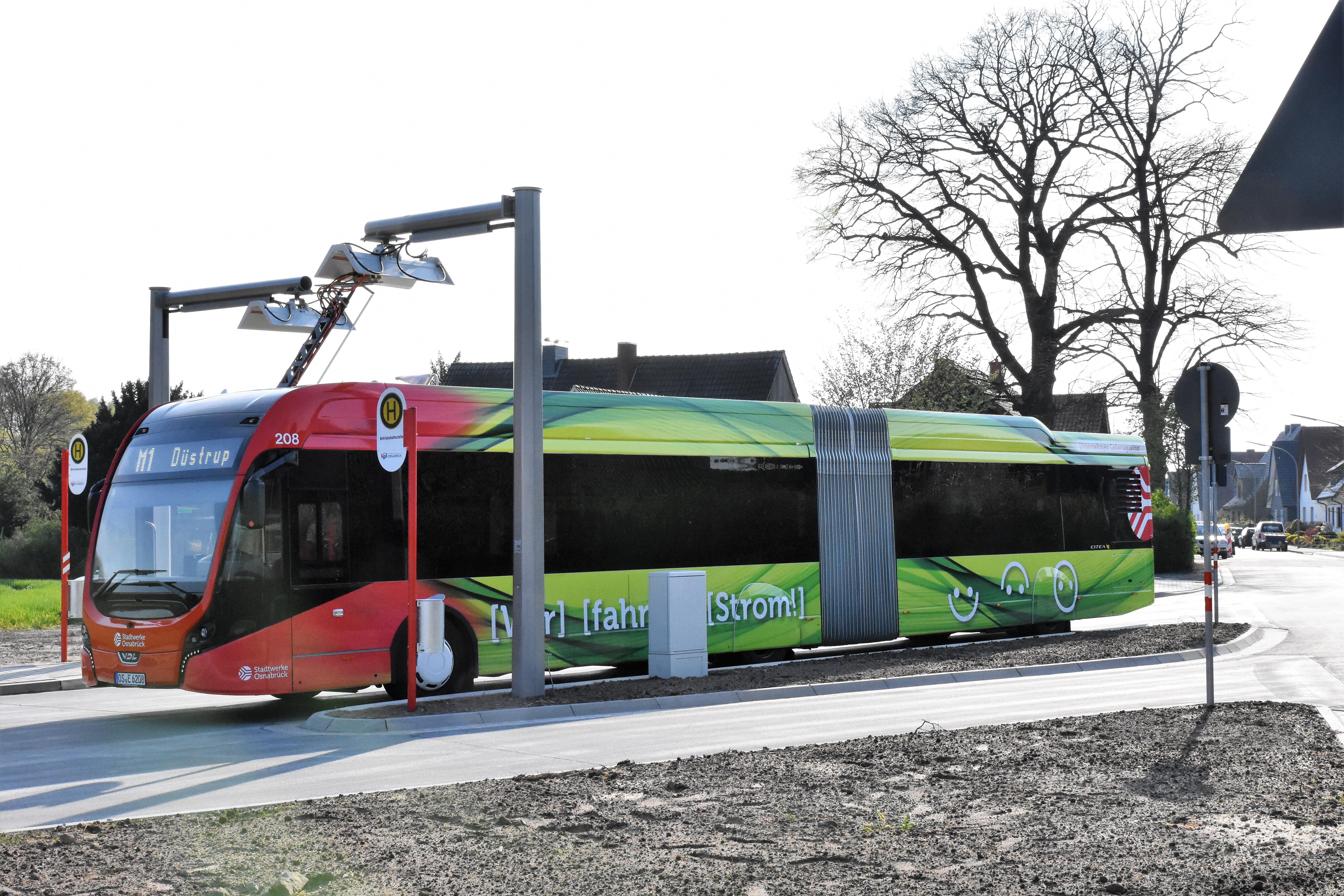 E-Bus läd an Wendeplatz in Osnabrück-Haste. Am Endpunkt der Metrobuslinie 1 in Osnabrück befindet sich eine Ladestation und Wendeplatz.